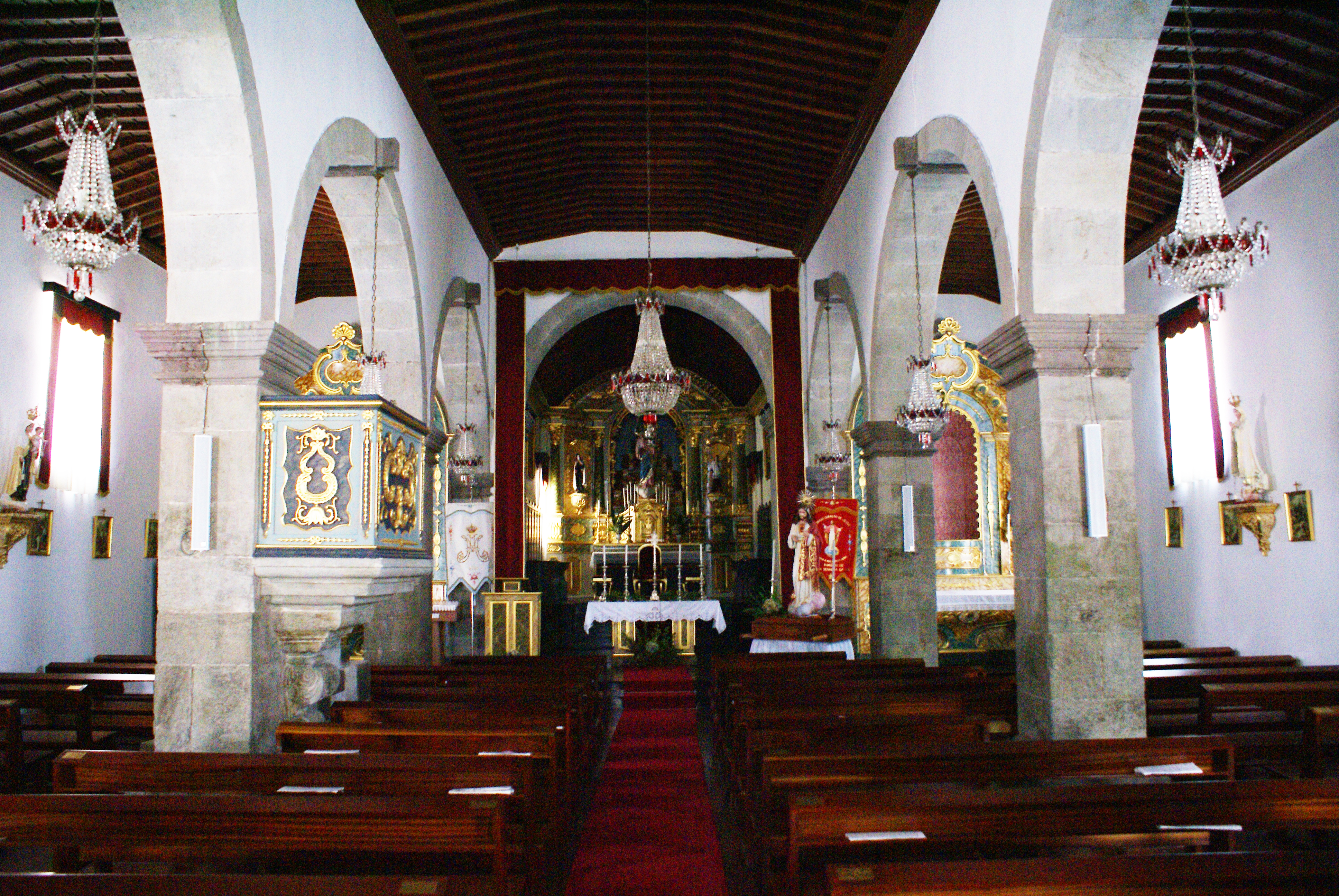 Igreja de Nossa Senhora da Luz, nave central, Santa Cruz da Graciosa, ilha Graciosa, Açores, Portugal